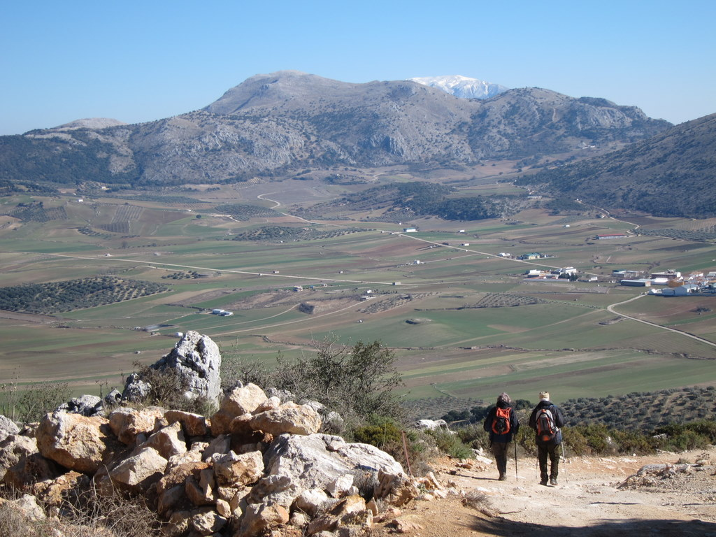 Valle de Alfarnate and pico de la Torca from Sierra de San Jorge